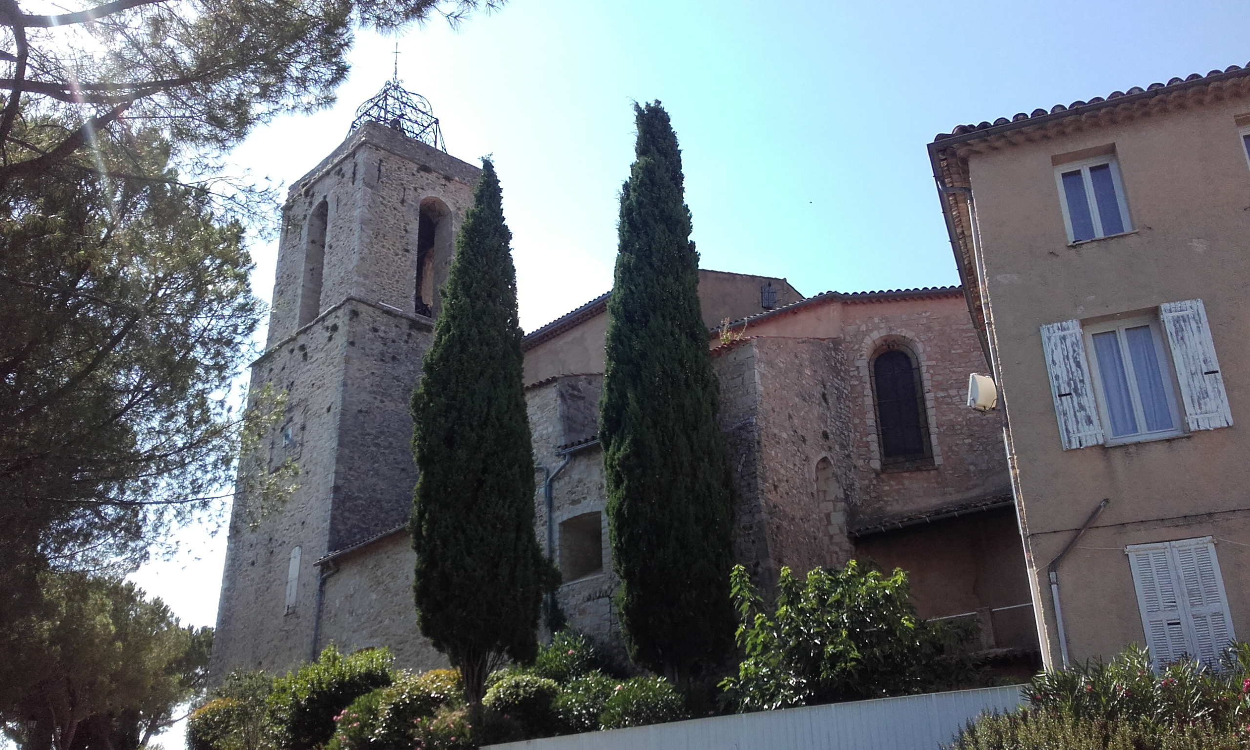 Var, Flayosc, Eglise Saint-Laurent La paroisse de Flayosc est nommée pour la première fois dans le cartulaire de l'abbaye de Saint-Victor en 1940. L'Abbé Joseph Neau (1909-2005), Curé de la paroisse de 1970 à 1984 a été le restaurateur de l'église Saint-Laurent et en partilier du clocher de l'église ou tour de l'horloge. Le parvis porte son nom.